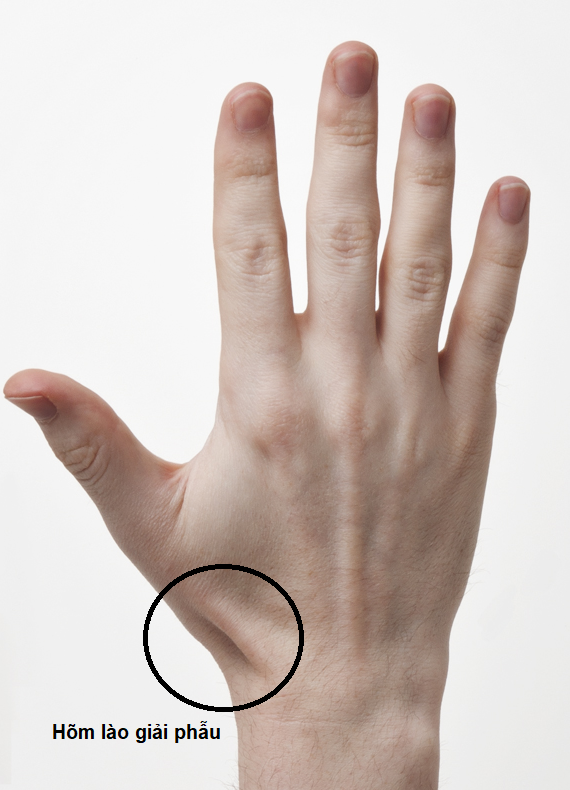 Hình ảnh vị trí của hõm lào giải phẫu